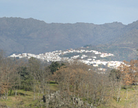 Eljas, en Cáceres (España)